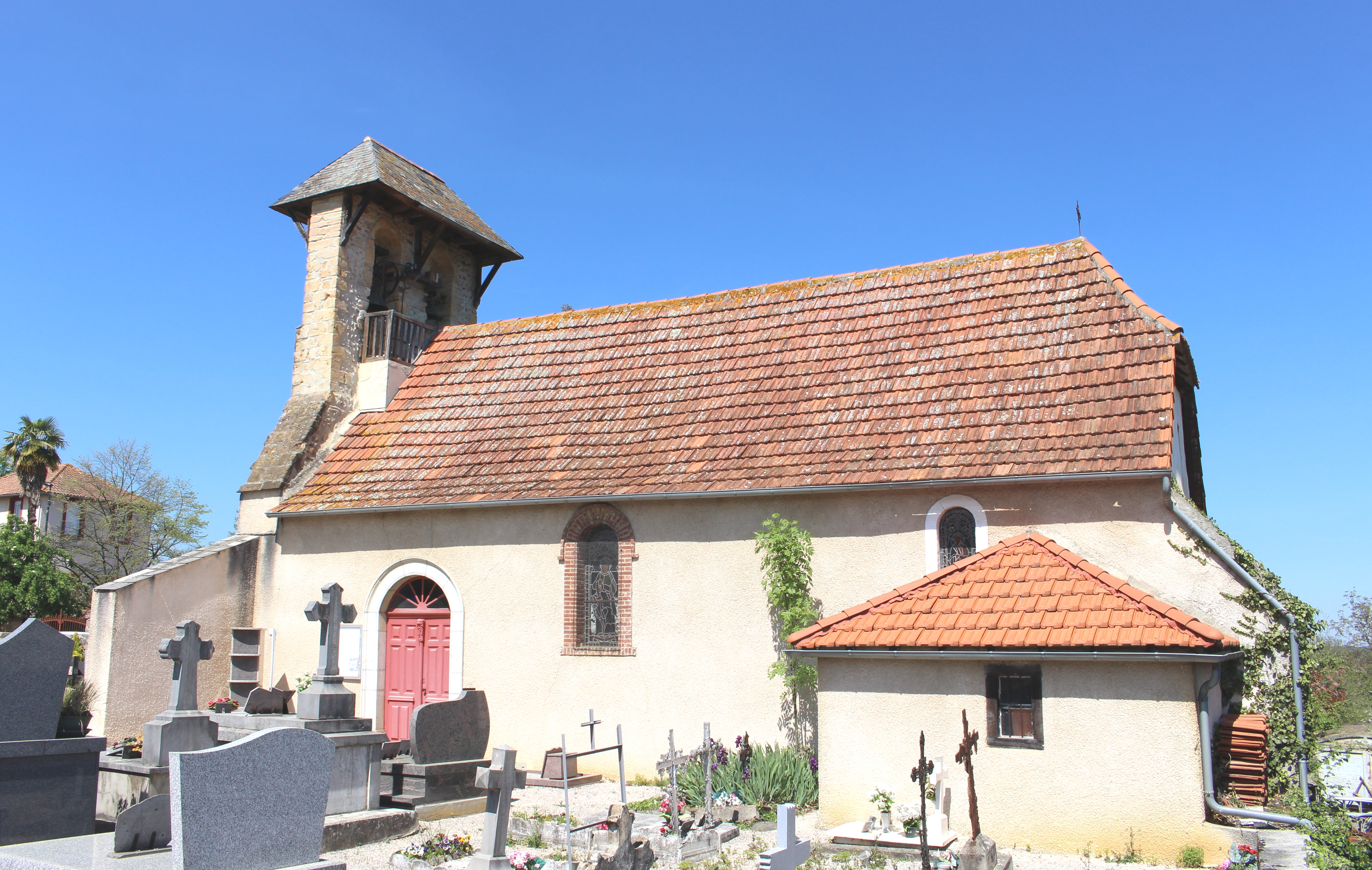 Église Saint-Martin de Calavanté (Hautes-Pyrénées)